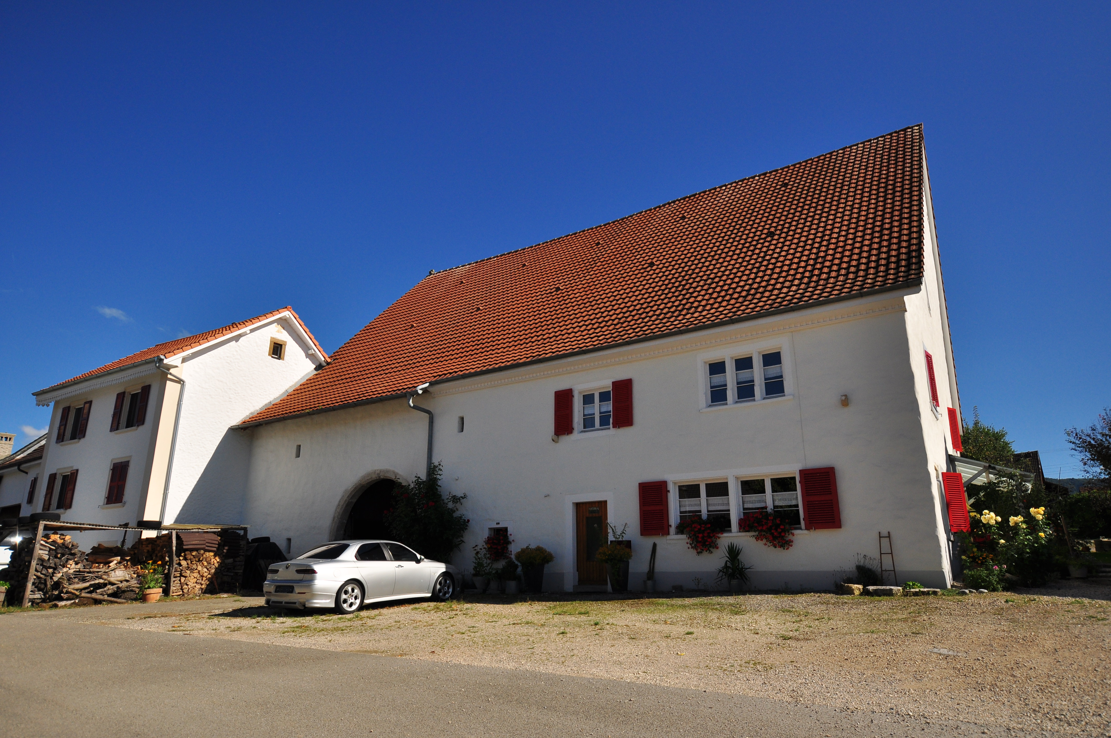 Ferme